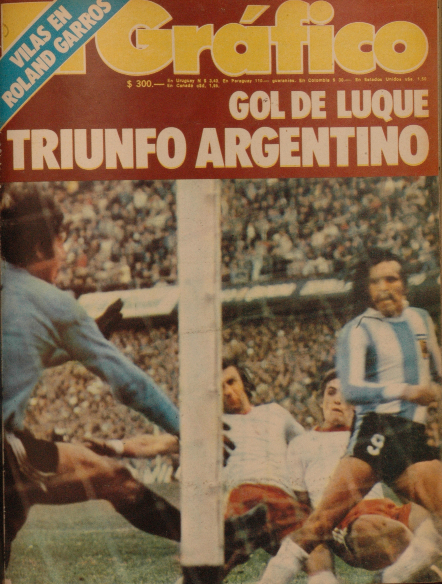 El Grafico del 31 de Mayo de 1977. Edicion 3008